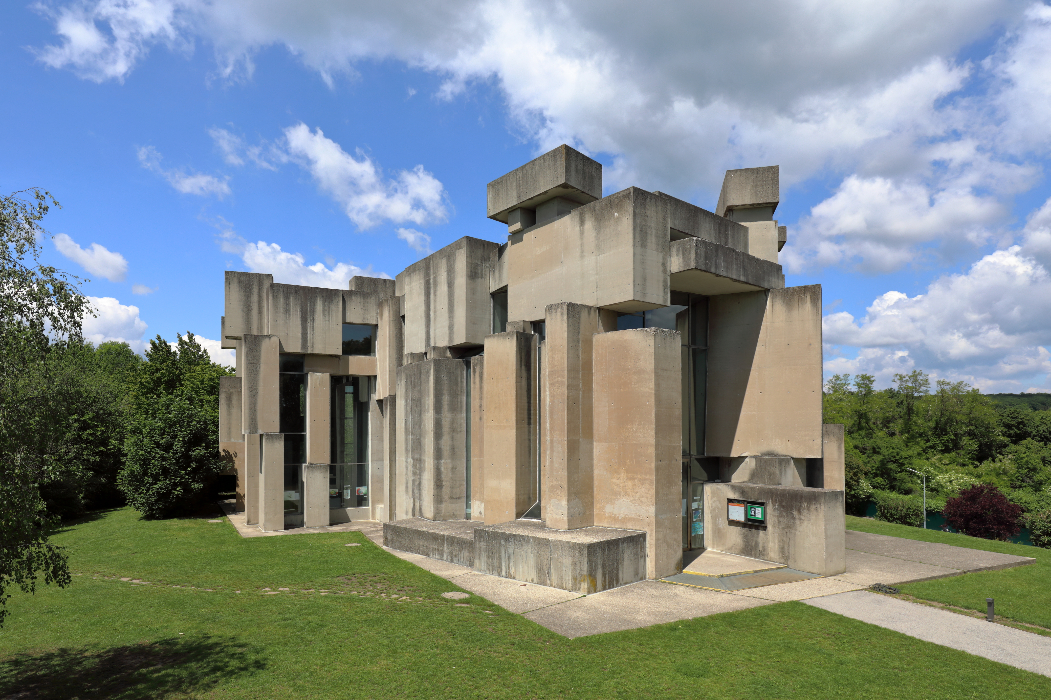 Südostansicht der Wotruba- bzw. Dreifaltigkeitskirche auf dem Georgenberg im Wiener Stadtteil Mauer des 23. Gemeindebezirkes Liesing.Die Kirche im Stil des Brutalismus wurde auf Initiative von Margarethe Ottillinger (1919–1992) und nach einer Idee des Künstlers Fritz Wotruba (1907–1975) vom Architekten Fritz Gerhard Mayr (* 1931) errichtet. Der Entwurf für die Kirche (152 Betonblöcke mit einen Gesamtgewicht von über 4000 Tonnen, ohne Symmetrie aufeinander geschachtelt, mit schmalen, verschieden hohen Fensteröffnungen) wurde von Wotruba 1964 präsentiert. Wegen großem Widerstand konnte man erst 1974 mit dem Bau beginnen und zwei Jahre später, am 24. Oktober 1976, erfolgte die feierliche Einweihung durch Kardinal Franz König.